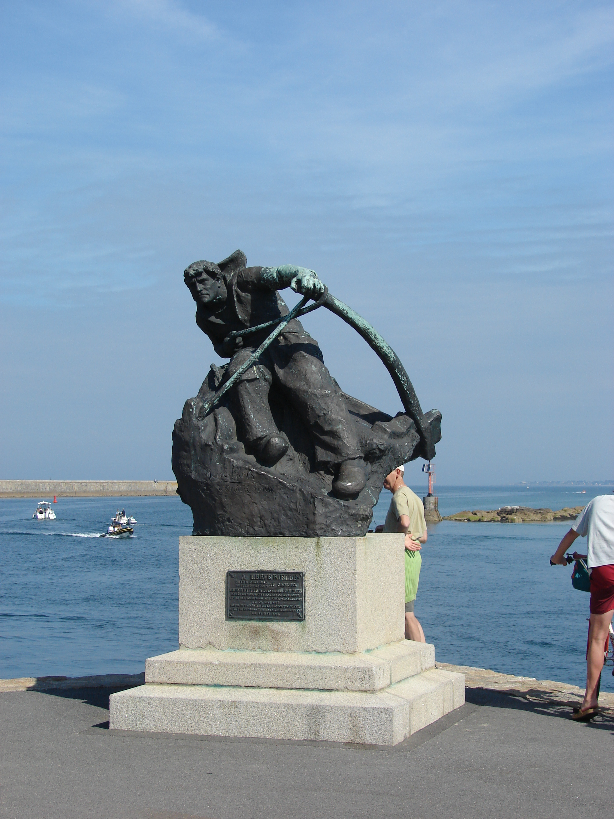 Herve Rielle (1654 - 1729), Le Croisic, Pays de la Loire, France